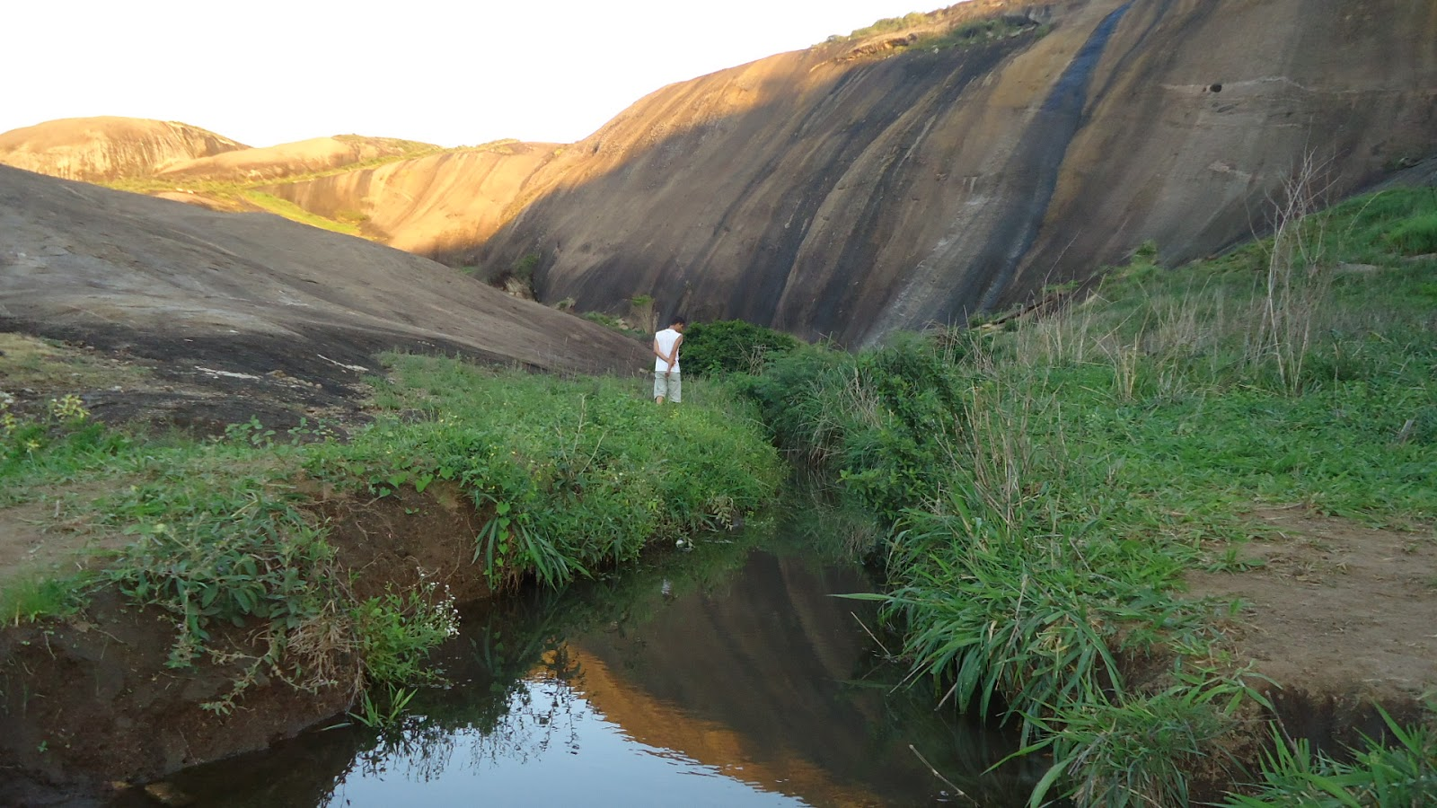 Pedra da Rocinha se encontra nas proximidades do perímetro urbano da cidade. É propícia para passeios e tem um curso d'água que nasce e corre por ela. Também há a Loca dos Caboclos, local onde se pode visualizar pinturas rupestres.